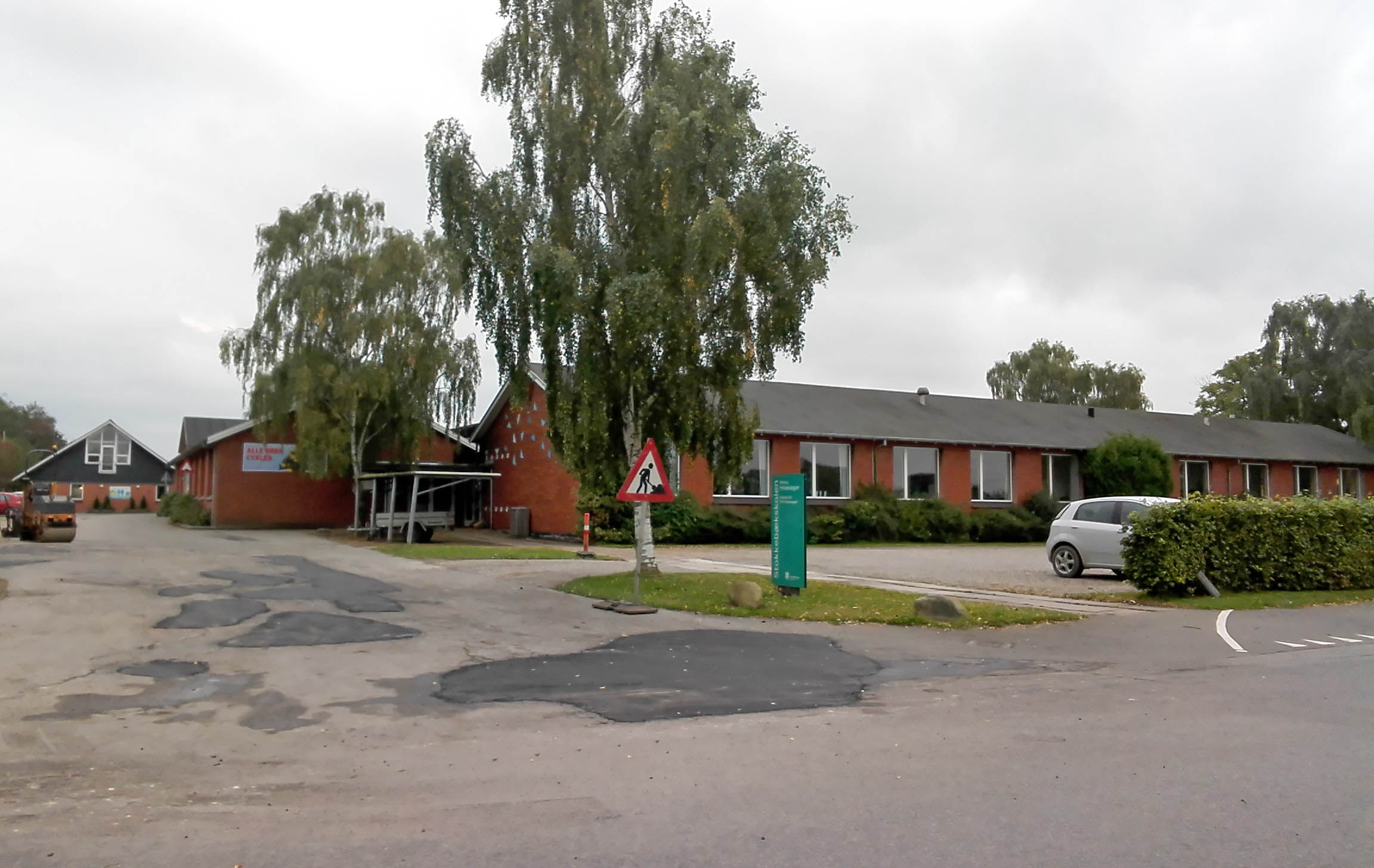 Stokkebækskolens afdeling i Hesselager